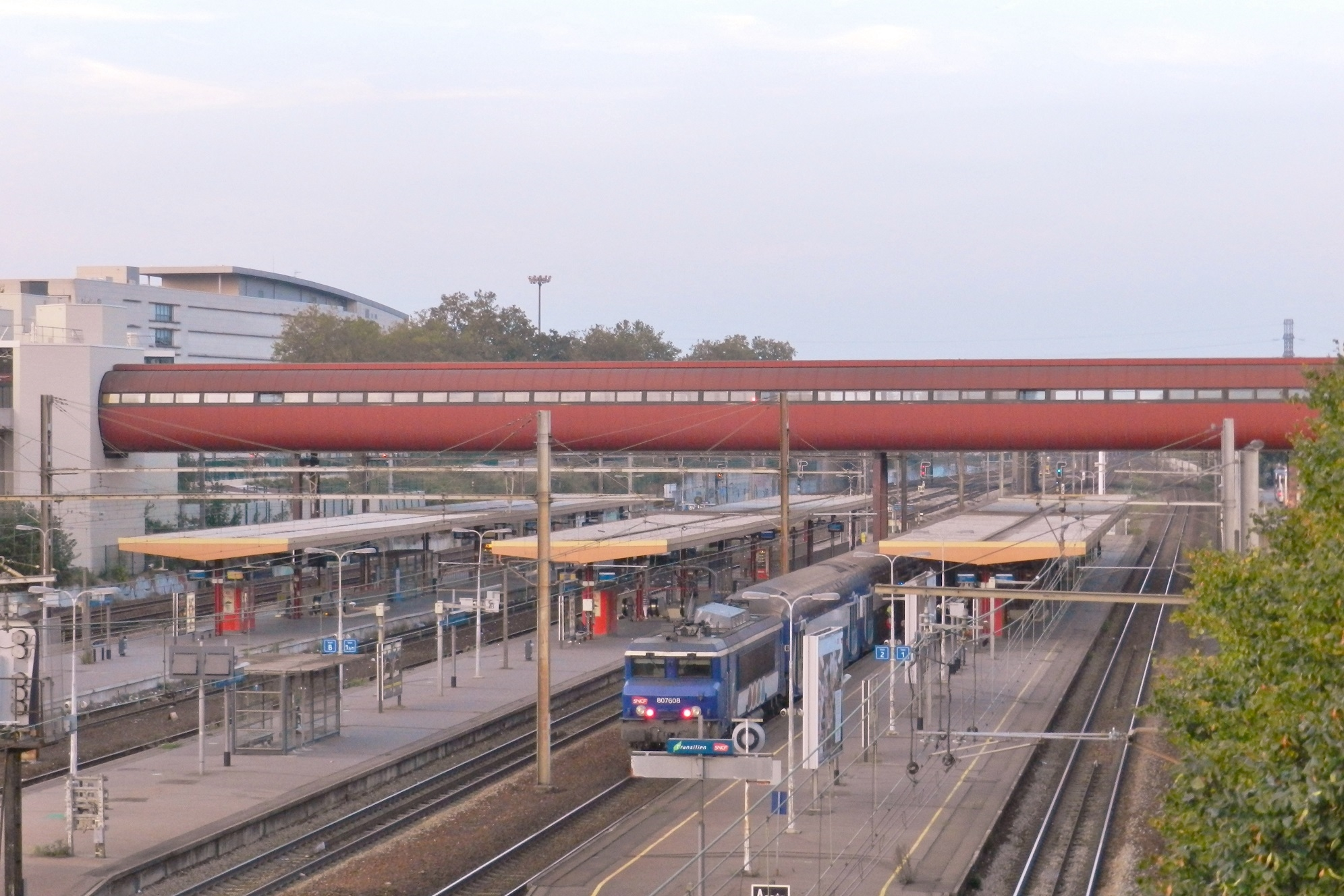 Vue générale de la gare de Saint-Quentin-en-Yvelines. Le VB2N poussé par un BB 7600, assure la mission PORO pour la gare de Paris Montparnasse sur la ligne N.